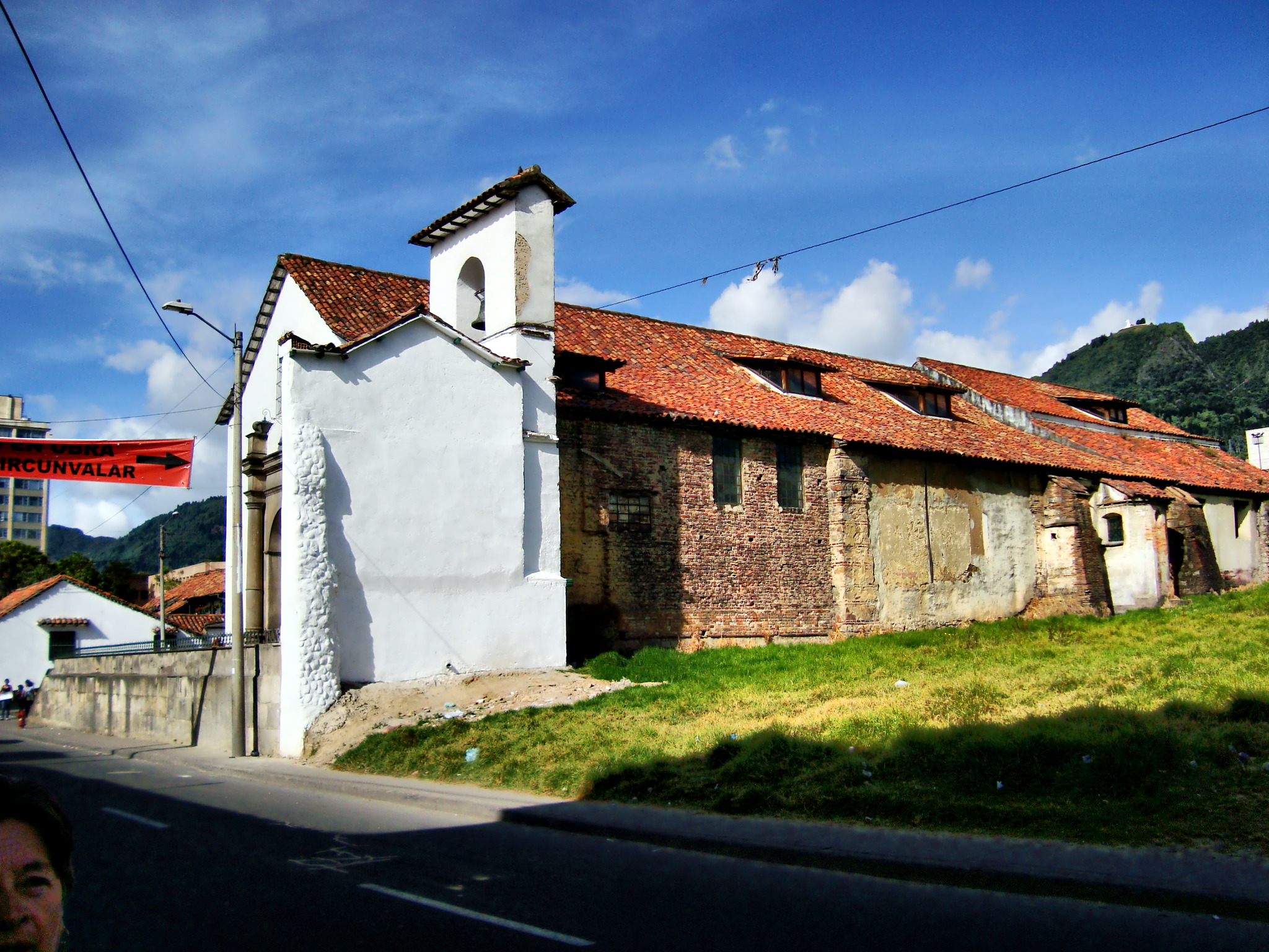 Iglesia de Santa Bárbara